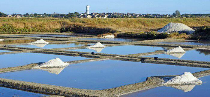 les marais salant de guerande